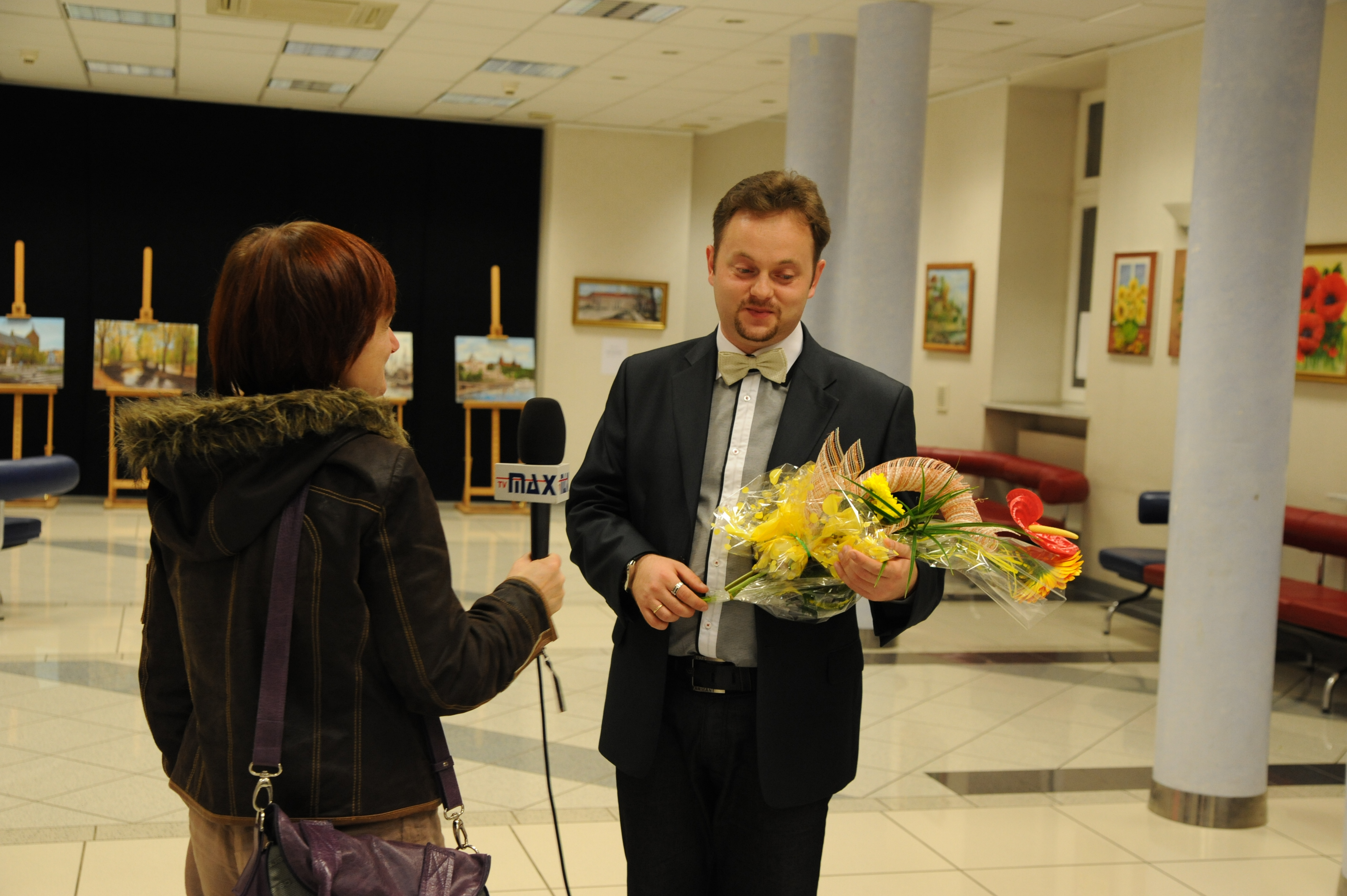 Po premierze Rapsodii na akordeon i orkiestrę symfoniczną w Filharmonii Koszalińskiej.